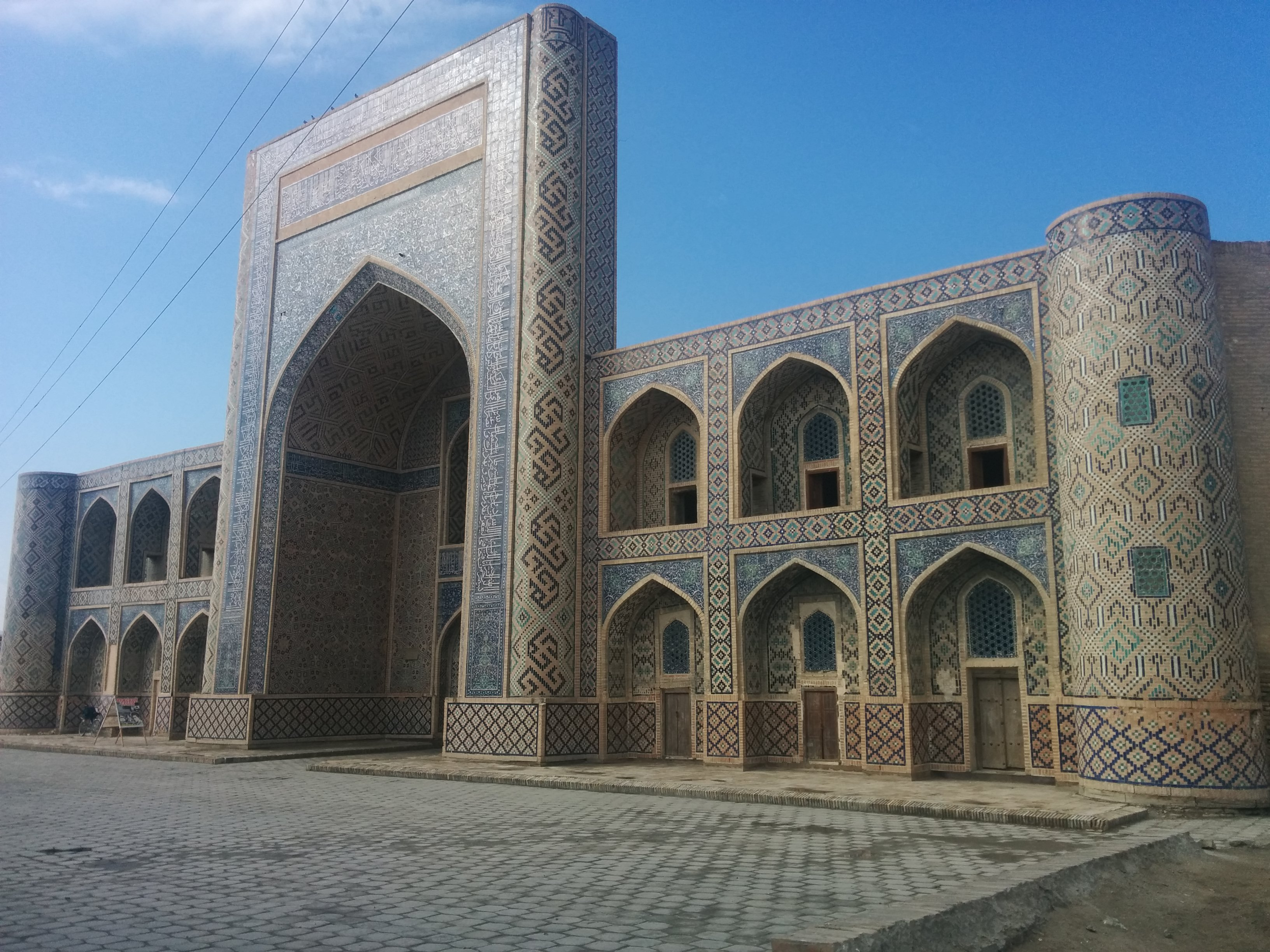 Buxorodagi Qo'sh madrasa ansamblining shimoliy qismida joylashgan me'moriy yodgorlik